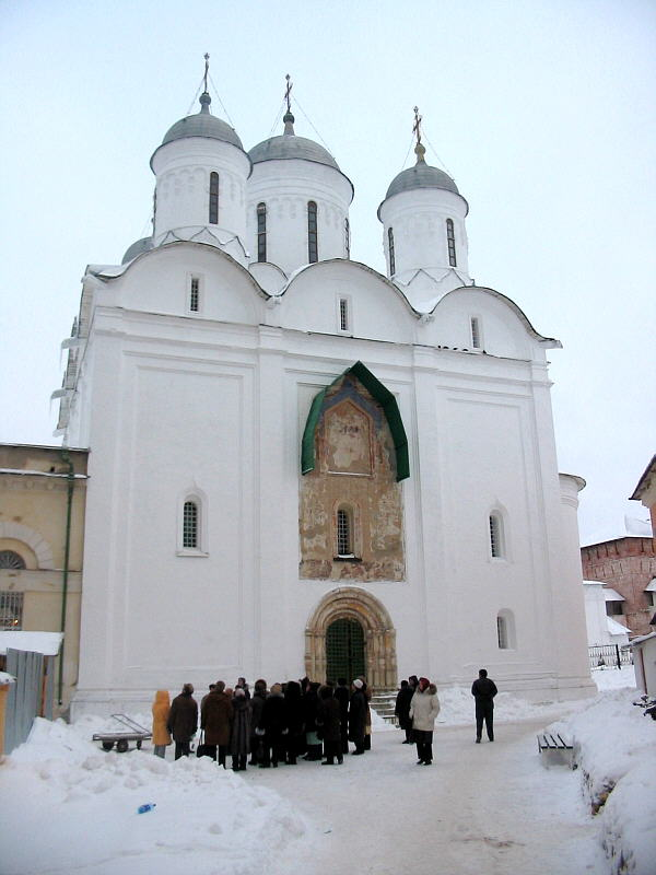 Pafnutievo-Borovsky Monastery, Russia